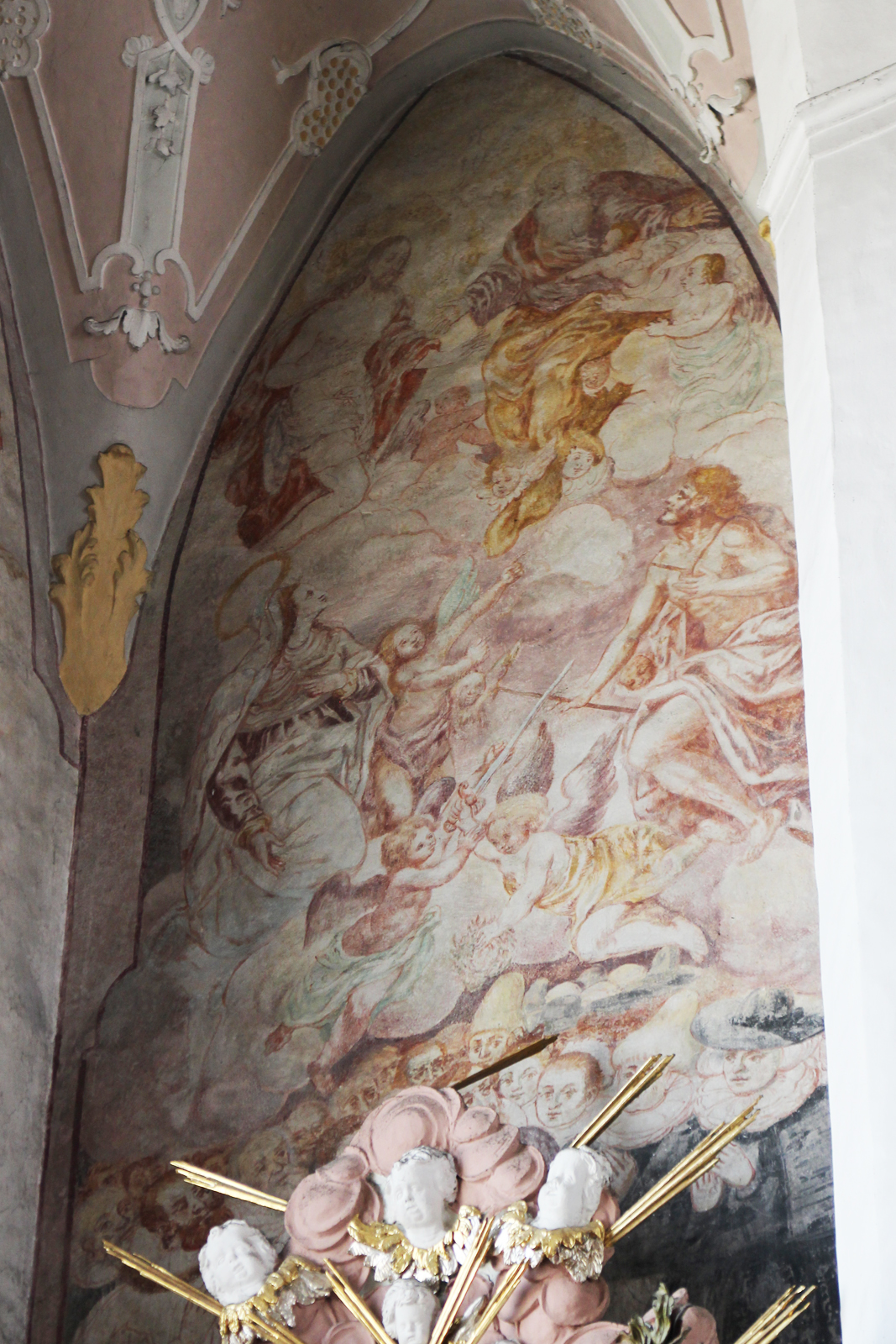 Wittelsbacher Fresko in der Pfarrkirche St. Laurentius Altheim, OÖ